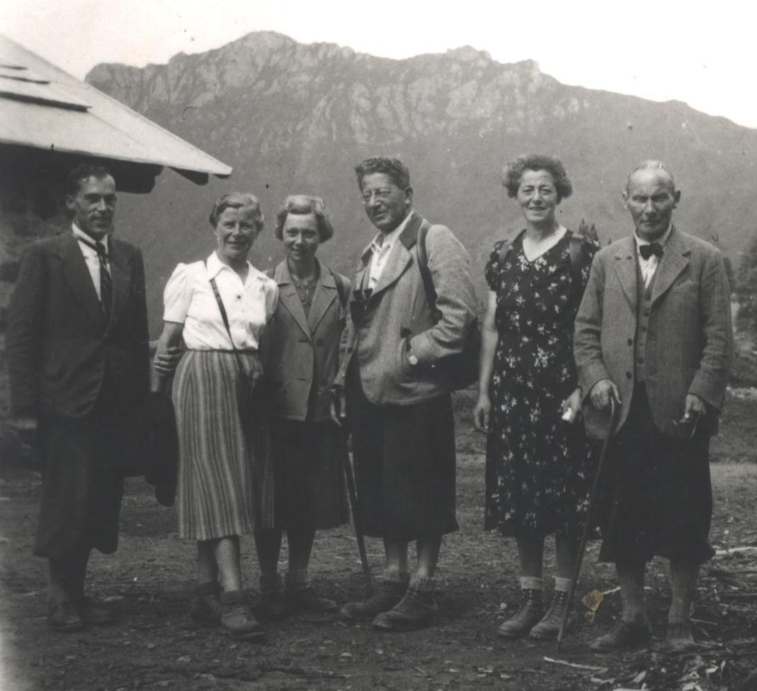 Simonin Chiocchetti, Valeria Jellici, Johanna e Richard Löwy, Martha e Hermann Riesenfeld a Moena nel 1943